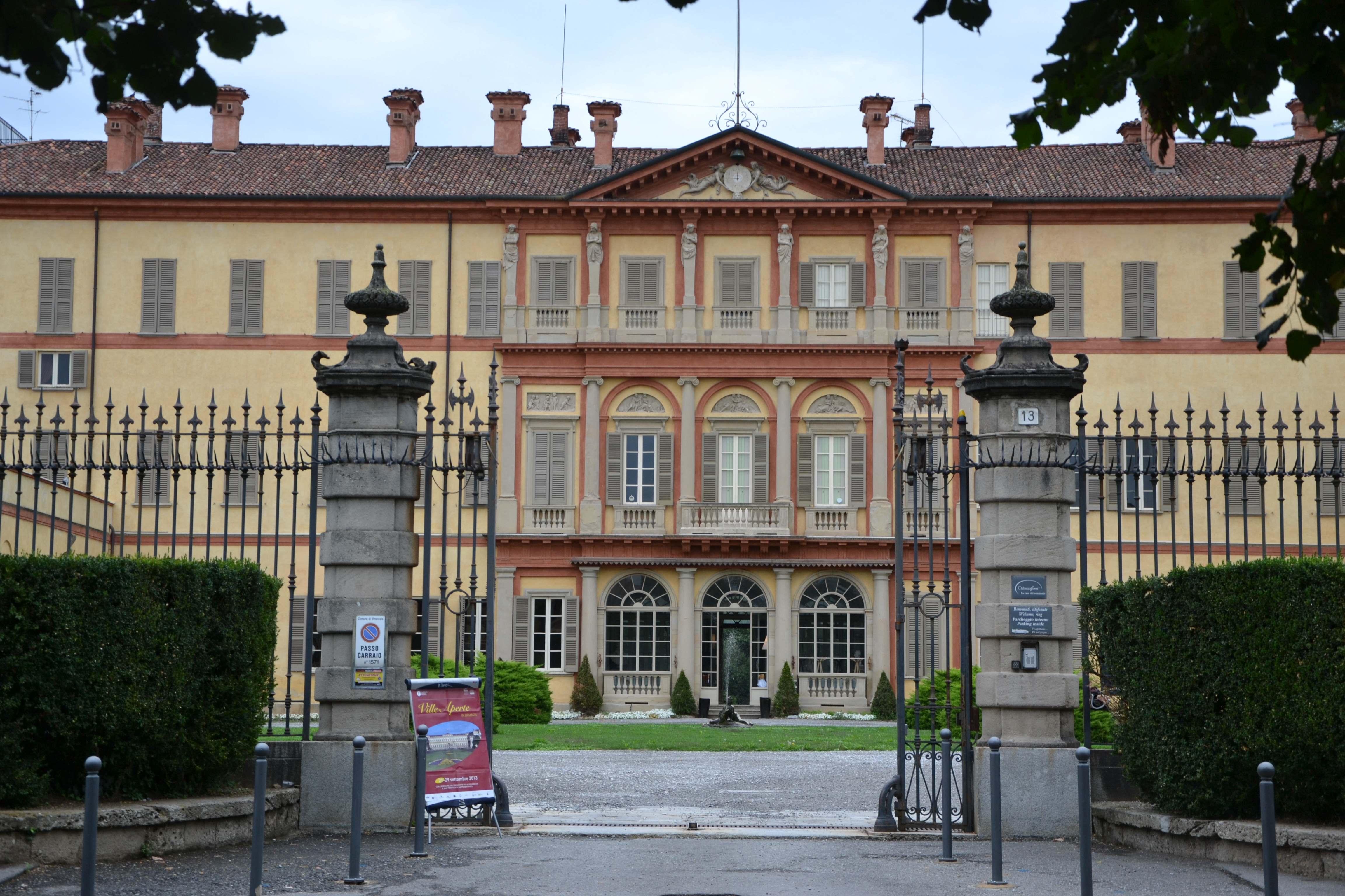 Villa Gallarati Scotti, Oreno di Vimercate (MB) - facciata principale verso la corte. Opera di Simone Cantoni (1790)